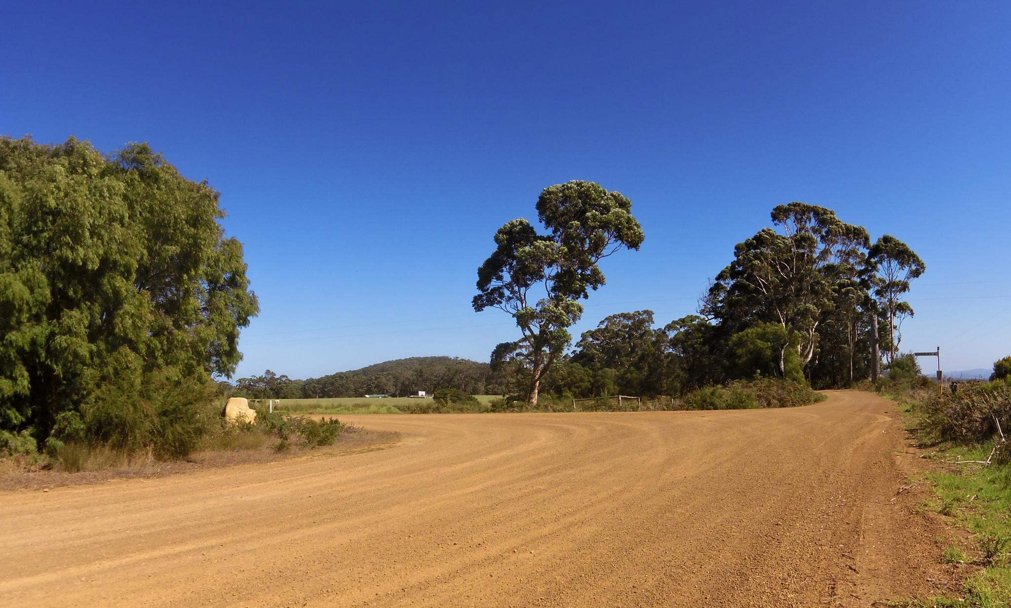 Bornholm WA